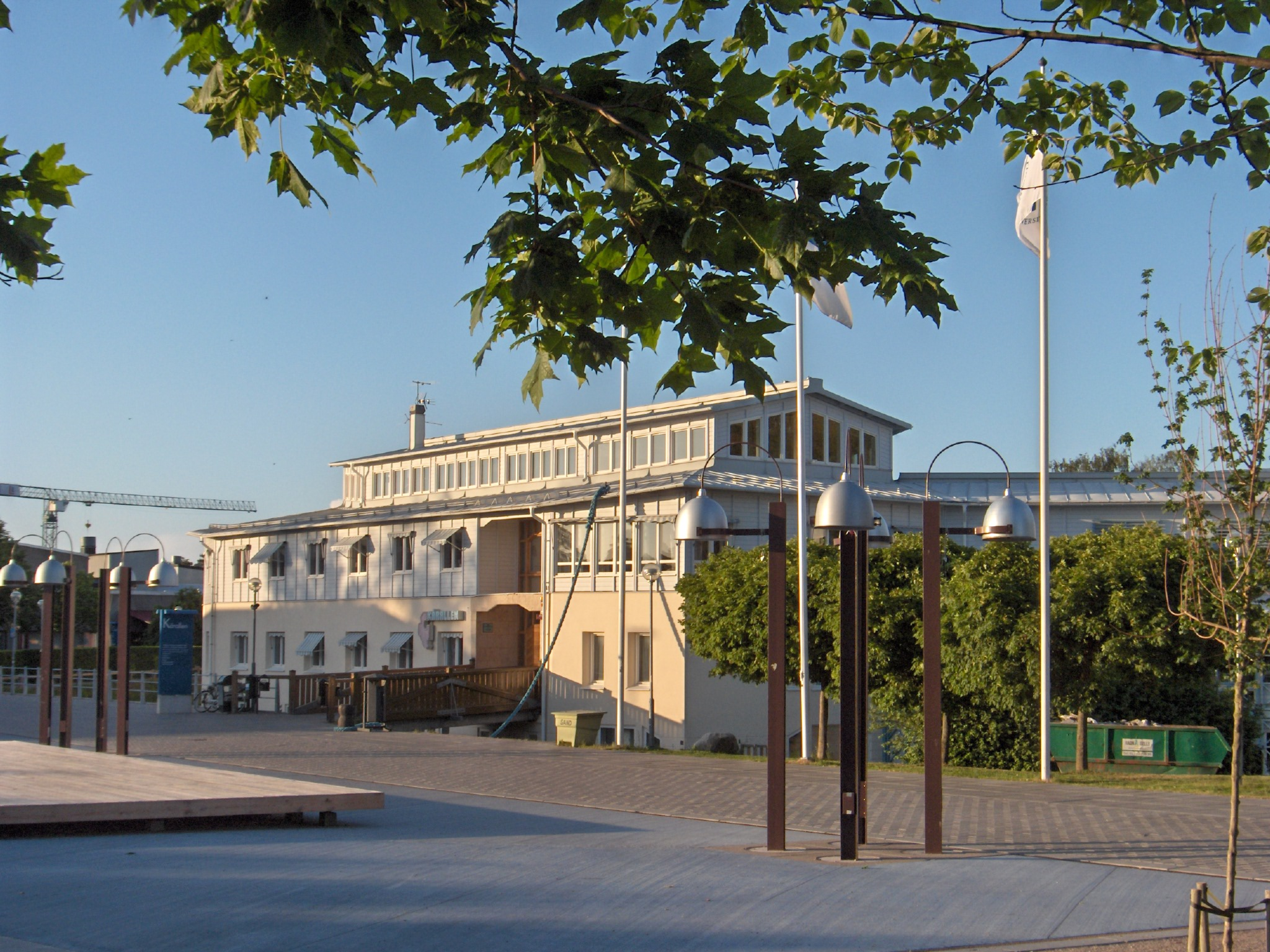 林雪平大学瓦拉校区的学生会建筑“Kårallen”